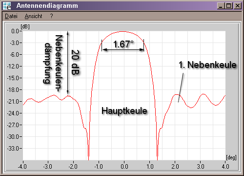 Collage eines Snapshoots von einem gemessenen vertikalen Antennendiagramm einer Parabolantenne. In diesem kartesischen Koordinatensystem sind die einzelnen Messwerte besser abnehmbar als in einem Polarkoordinatensystem